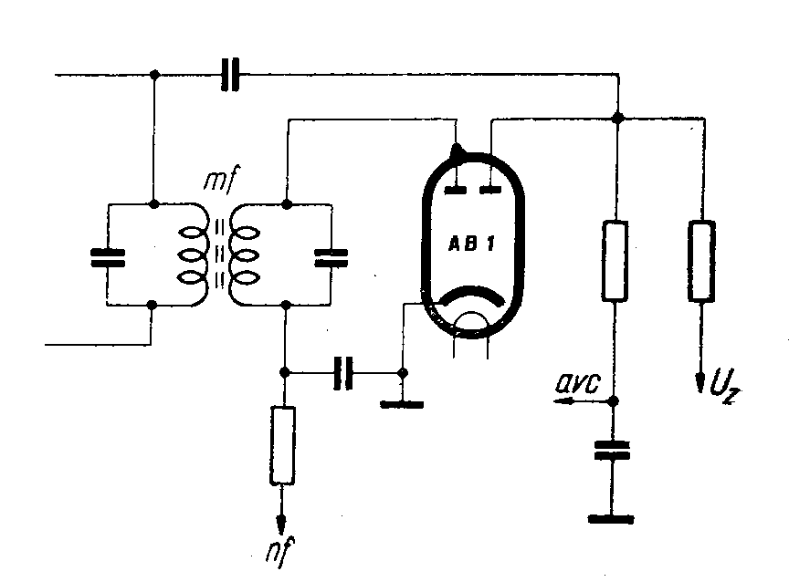 AM demodulator, AB1 tube